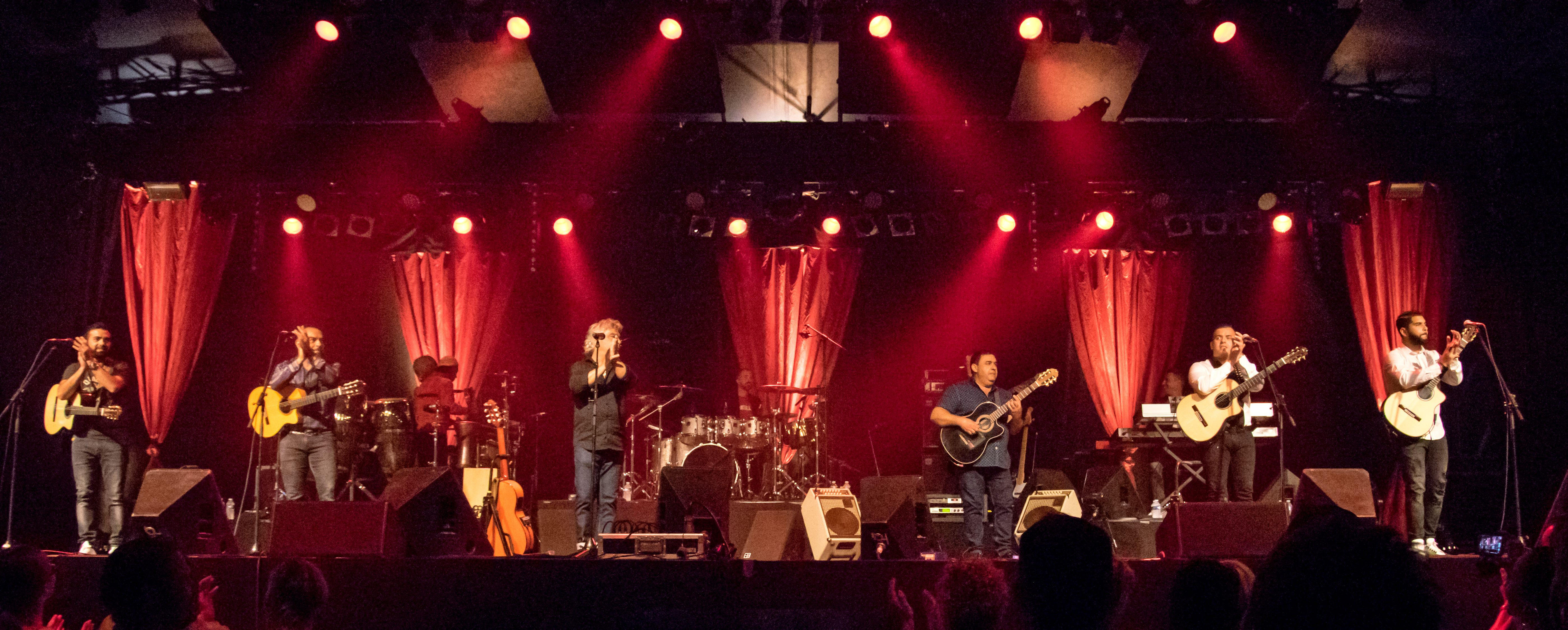 Bilder vom Zelt Musik Festival 2016 in Freiburg im Breisgau Gipsy Kings